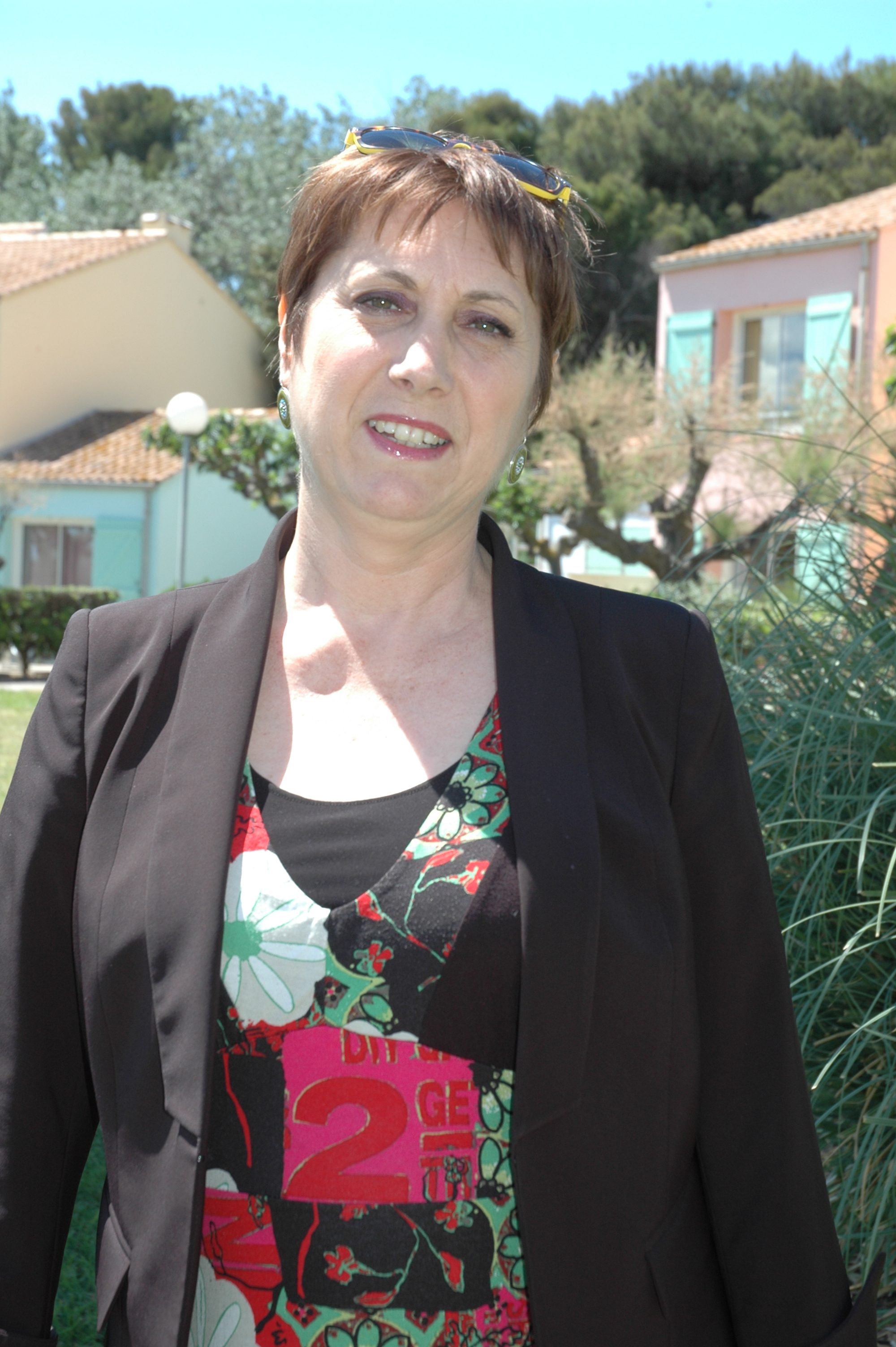 Secrétaire générale de la FSU. Photo prise lors du congrès du SNE à Mèze le 13 mai 2014